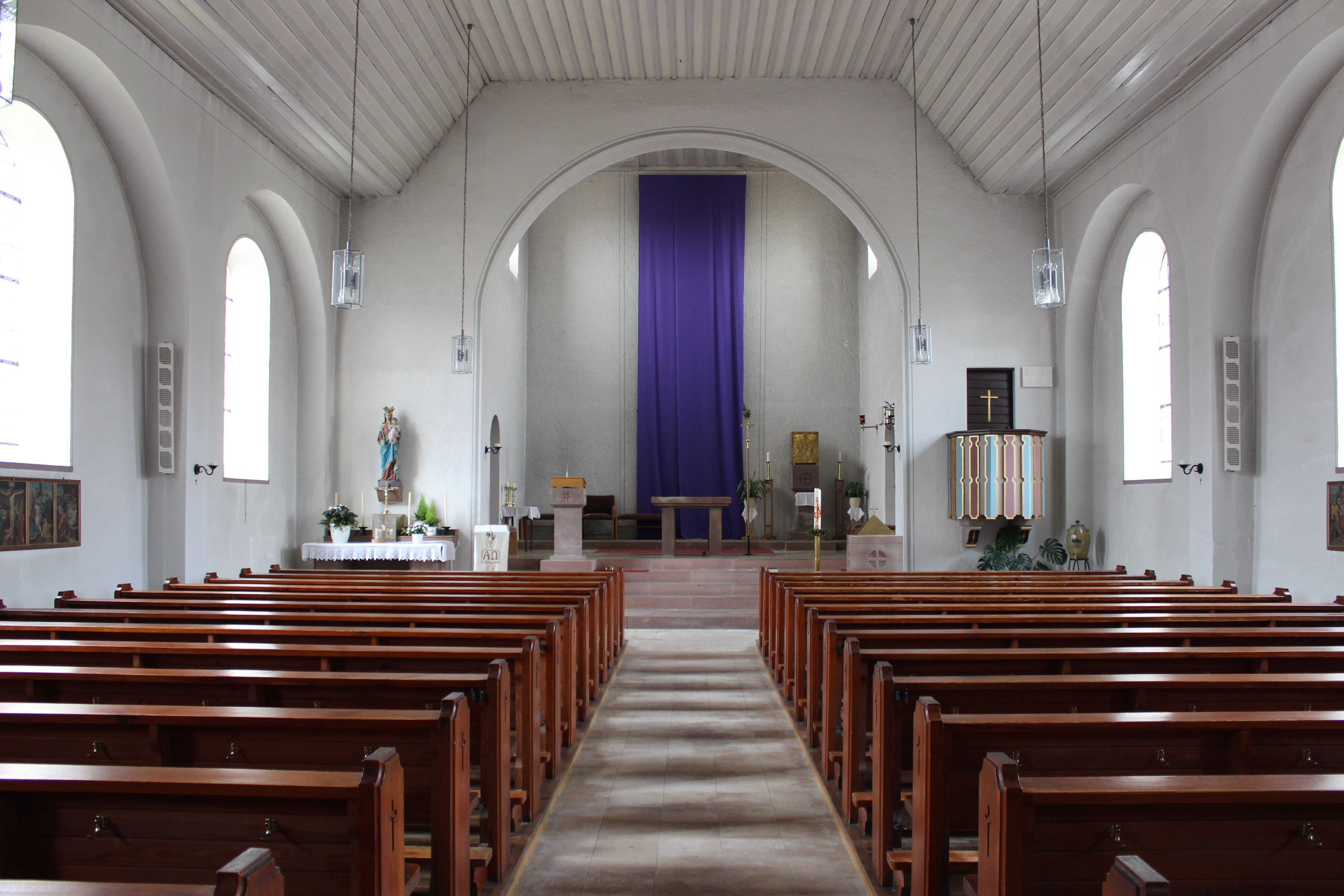 Blick ins Innere der katholischen Kirche St. Remigius in Wittersheim, Mandelbachtal, Saarland.